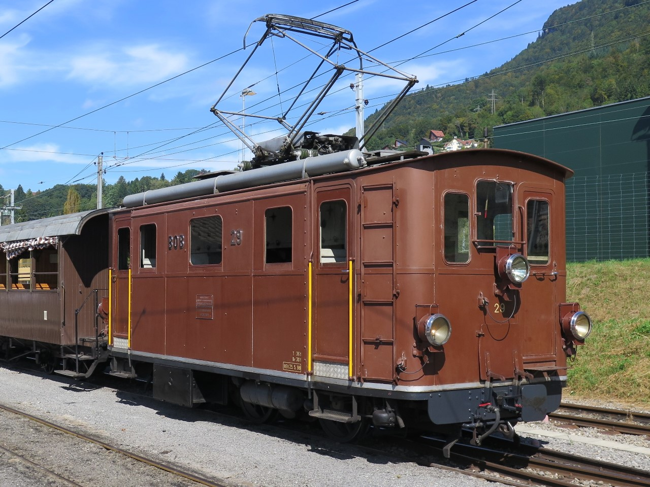 Historischer Lokomotive HG 3/3 29 aus dem Jahre 1926 der Berner-Oberland-Bahn (BOB) bei der Museumsbahn Blonay-Chamby (BC) im September 2013 in Blonay in der Westschweiz.